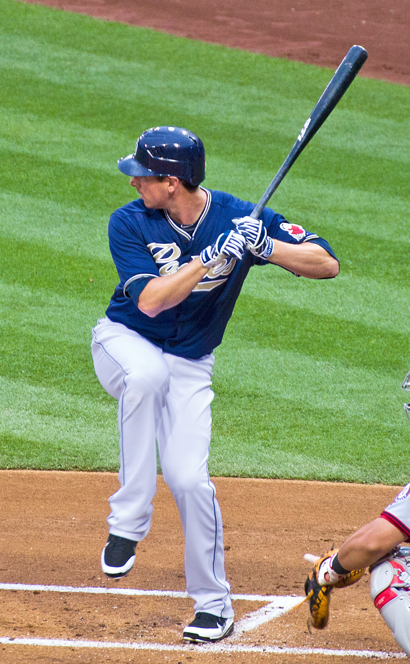 Brad Hawpe